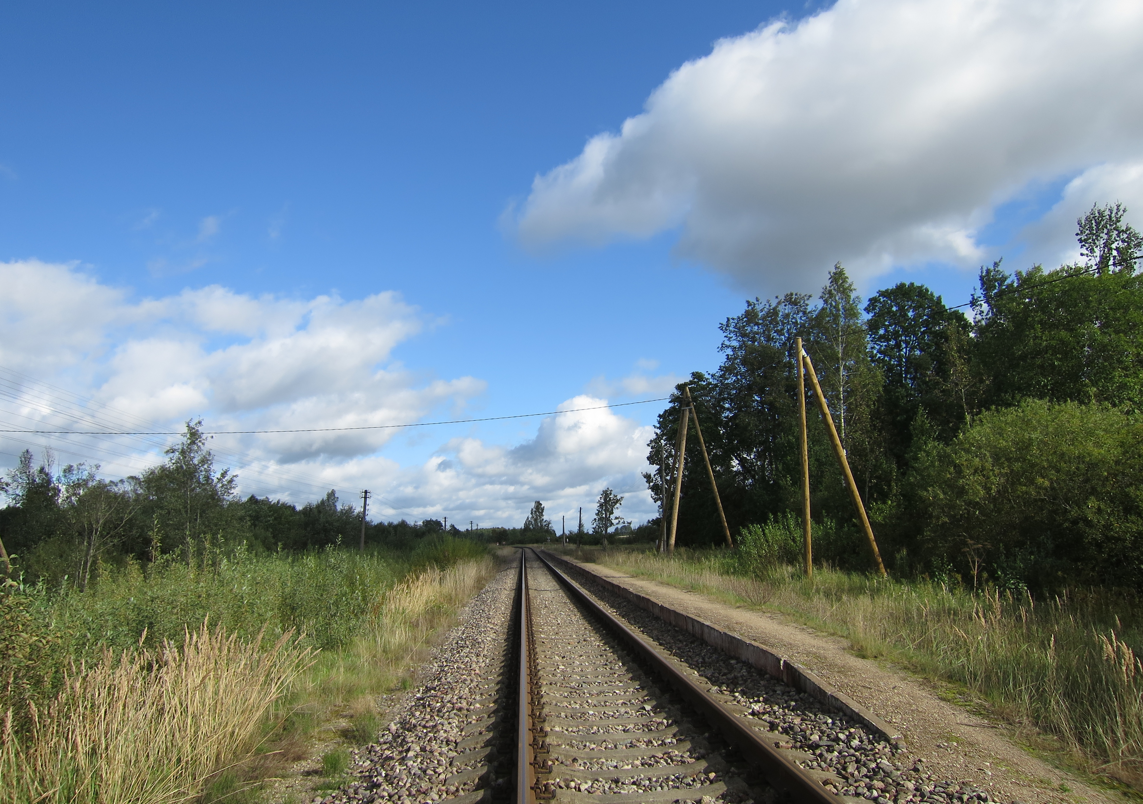 Bijusī Elstes dzelzceļa pietura, skats Gulbenes virzienā